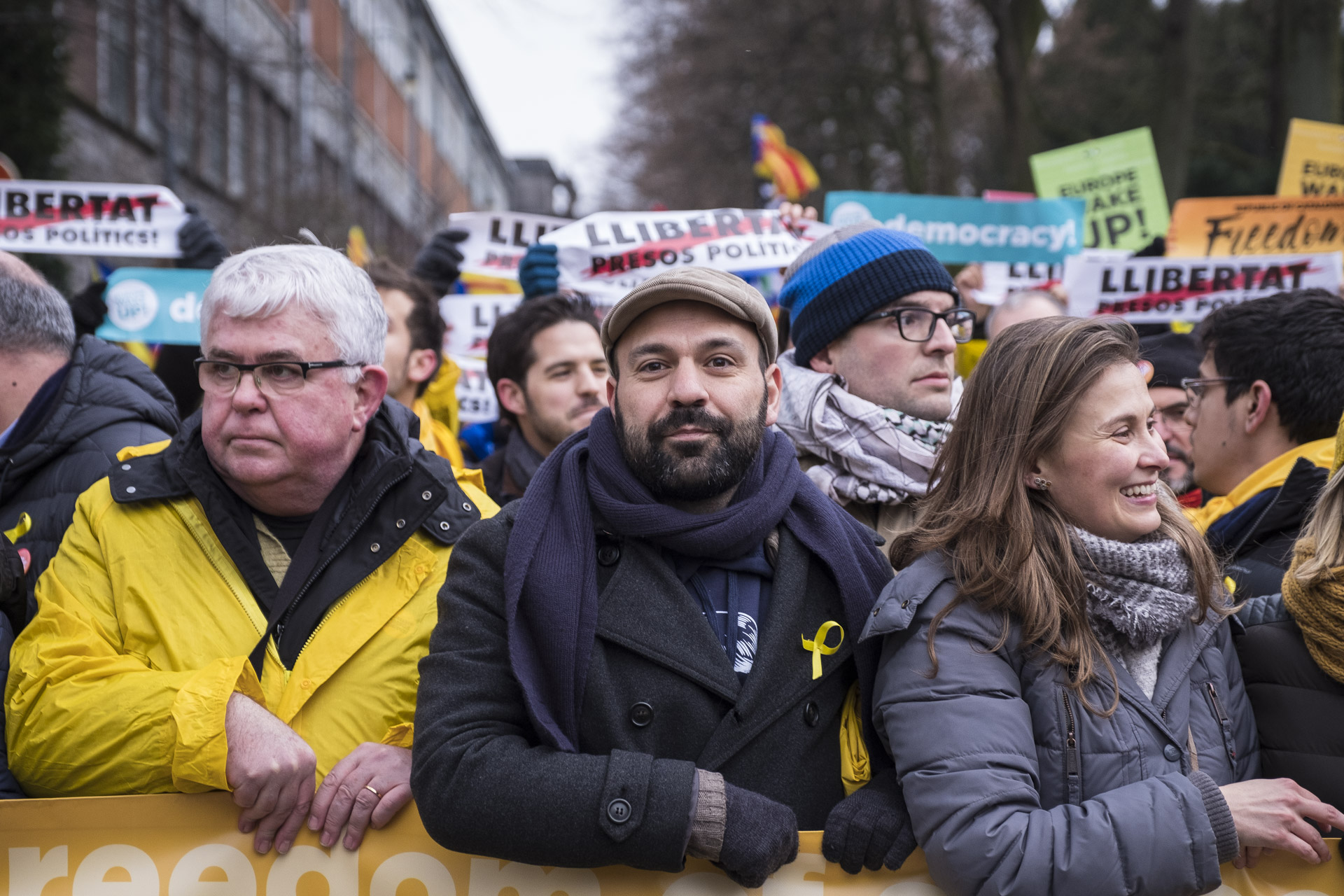 Manifestació per al 7 de desembre de 2017 a Brussel·les per reclamar l'alliberament dels presos catalans per haver defensat la creació de la República Catalana